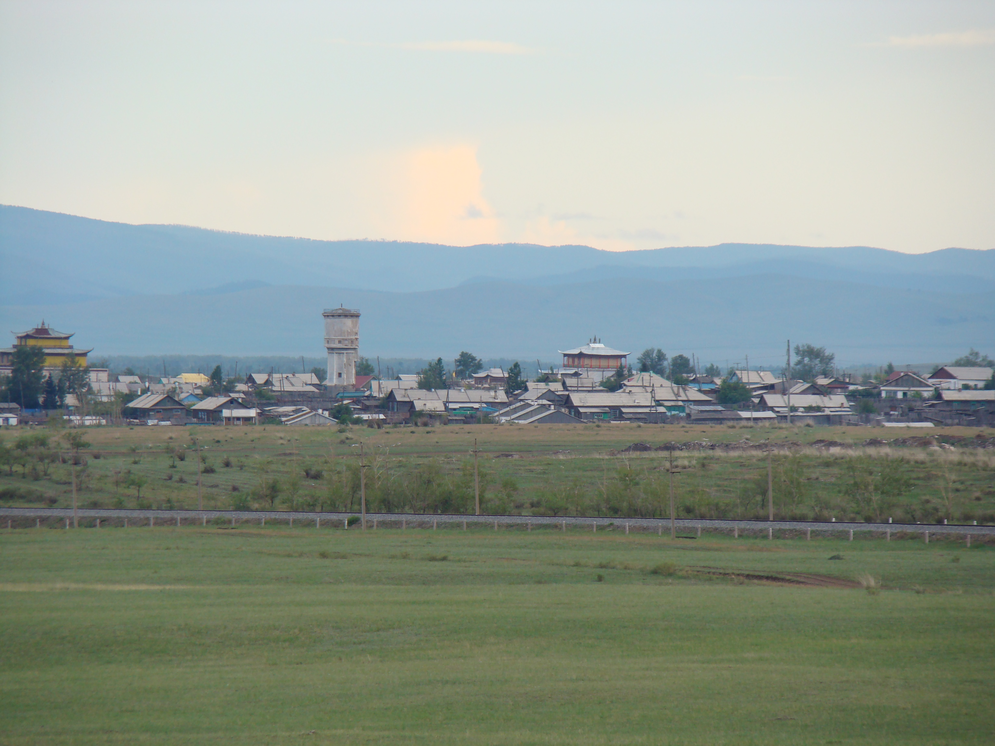 поселок Гусиное Озеро